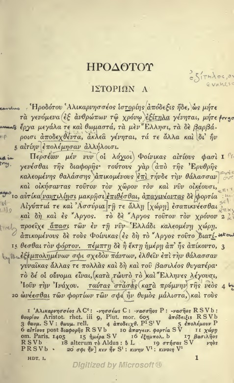 Herodoti Historiae. 1 / recognovit brevique adnotatione critica instruxit Carolus Hude. - Oxonii : E Typographeo Clarendoniano, 1908. - 1 volume (senza paginazione) . [1]